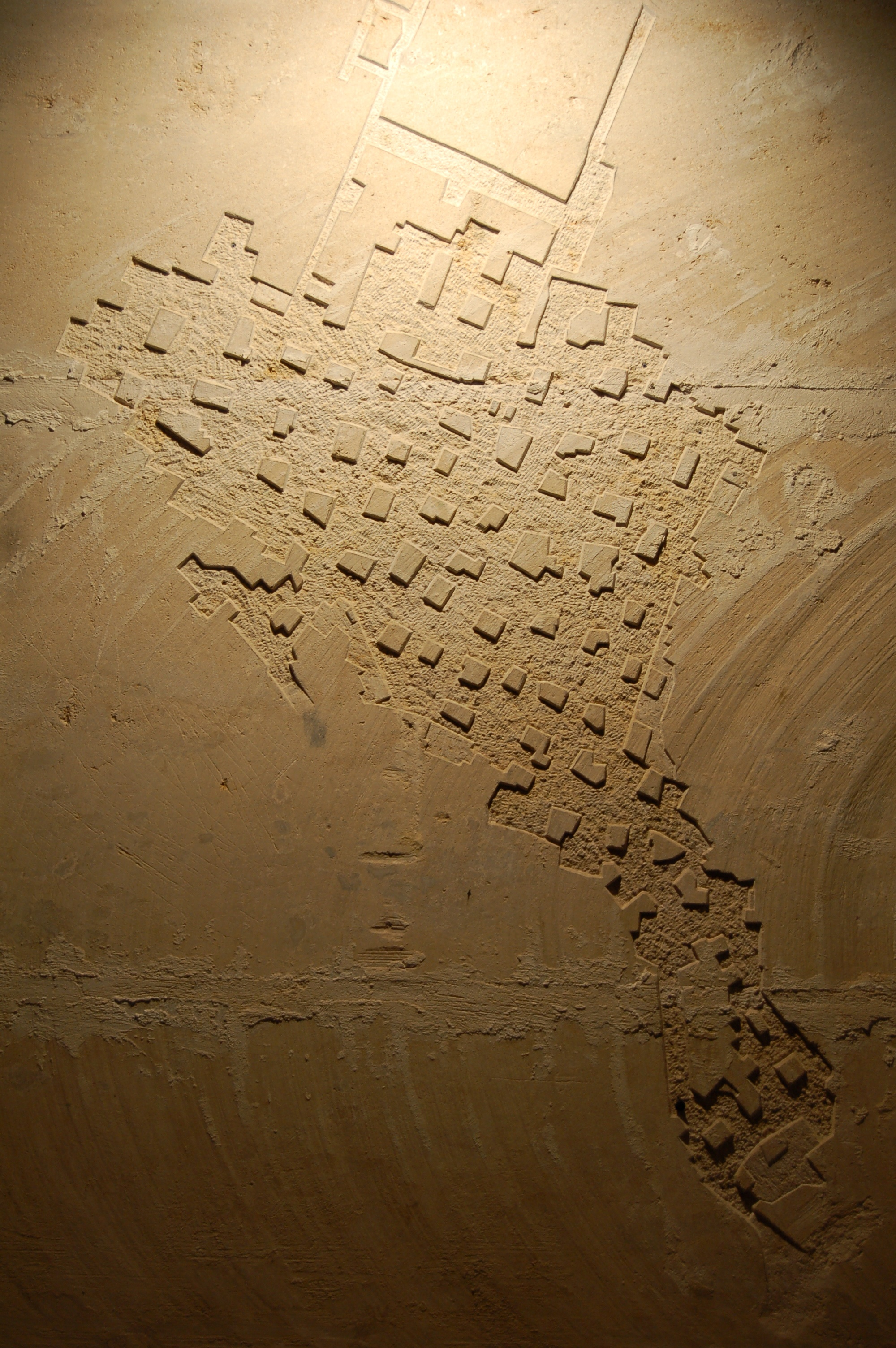 Römersteinbruch Aflenz, Übersichtskarte der Stollen (Karte in Sandstein geritzt)